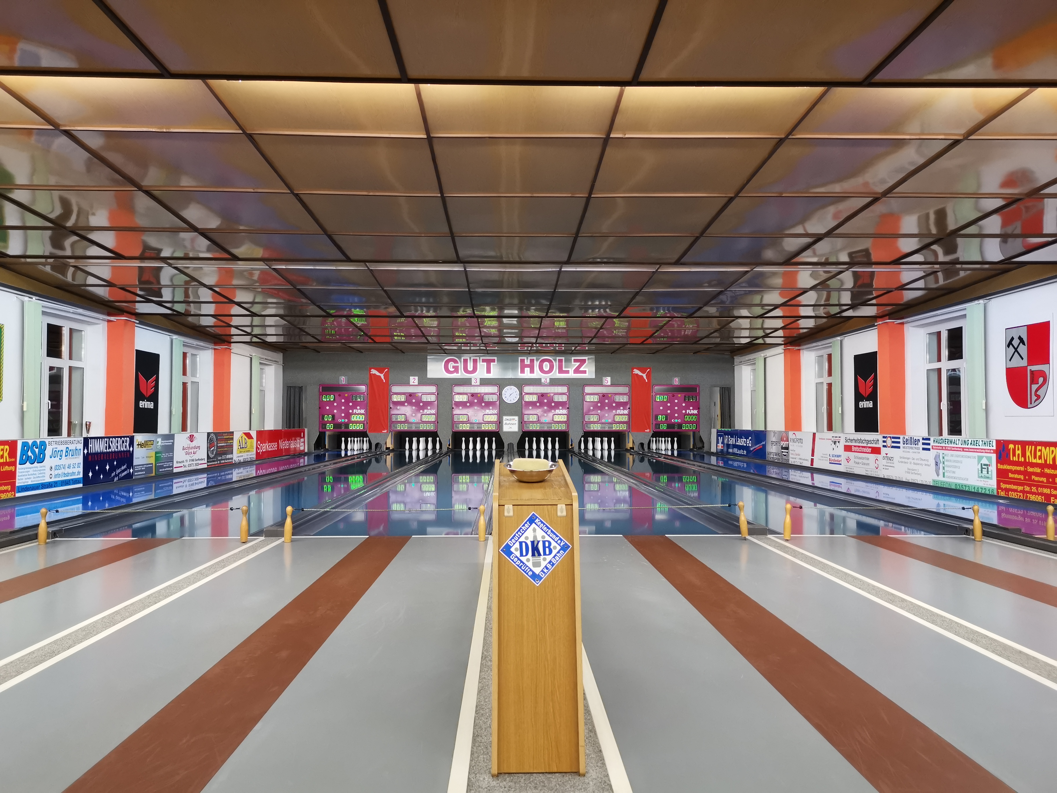 Kegelbahn in Senftenberg am Sportplatz Briesker Straße